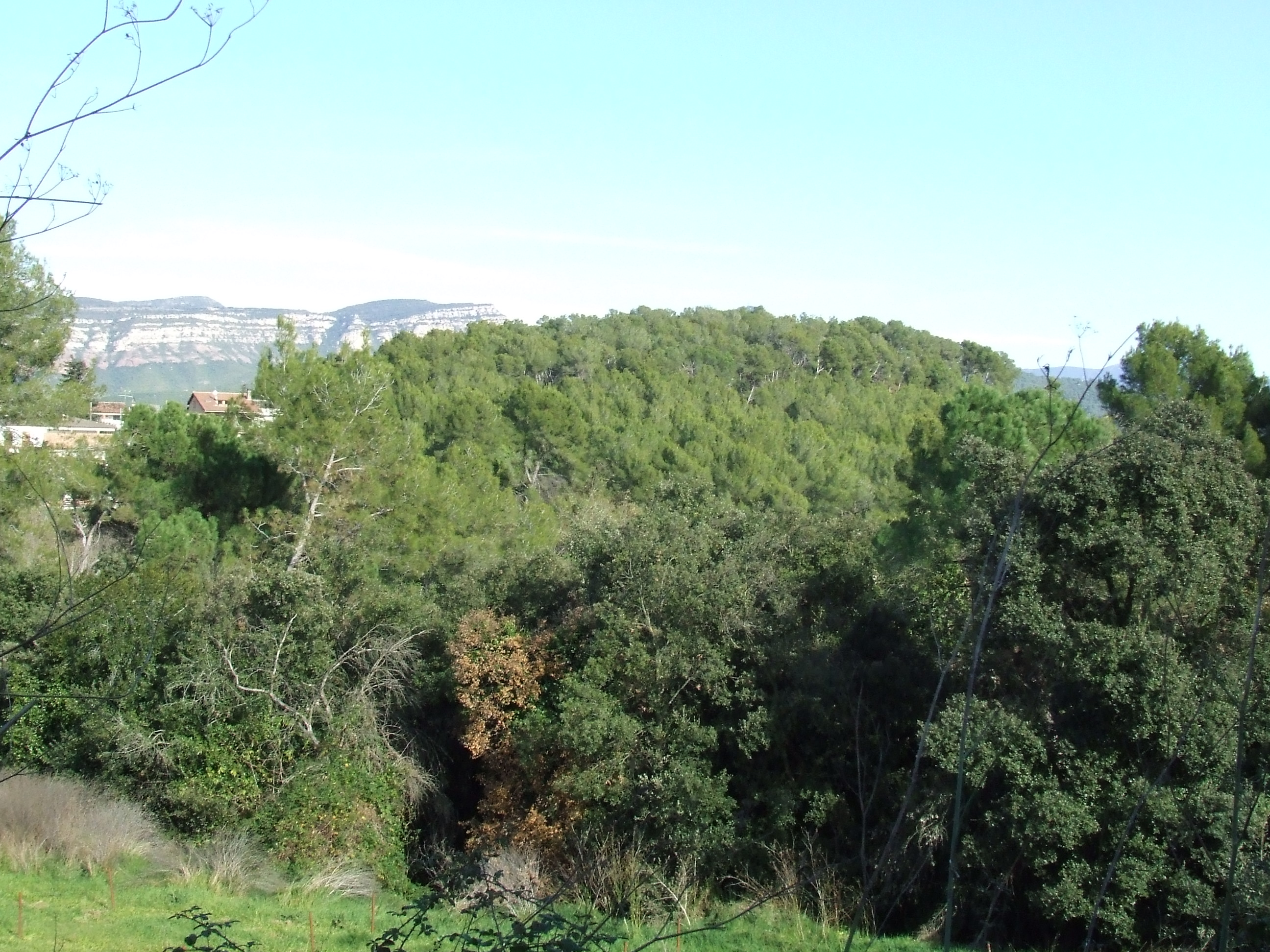 Turó de la Calcina (Bigues, Bigues i Riells, Vallès Oriental)